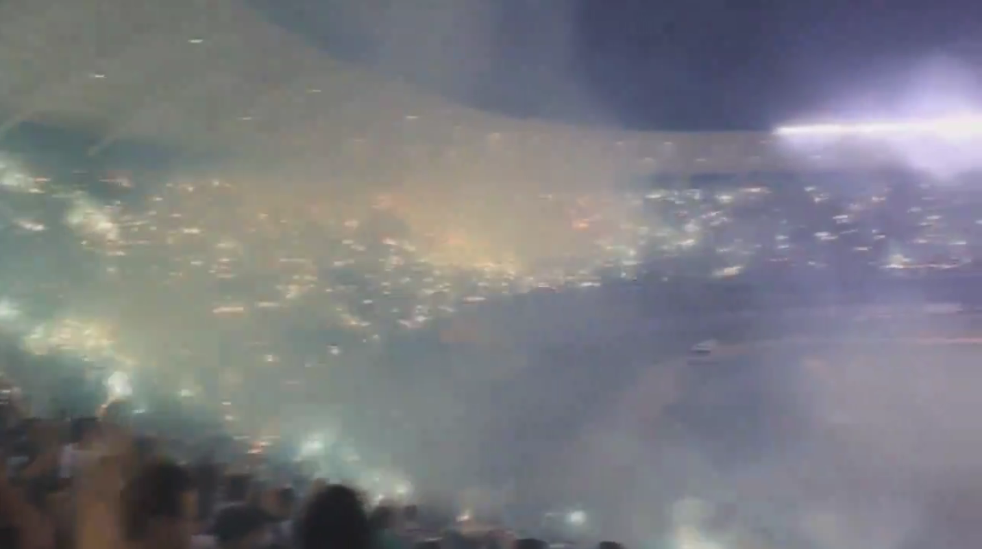 Ceará 0x0 Corinthians. Público total de mais de 55 mil.